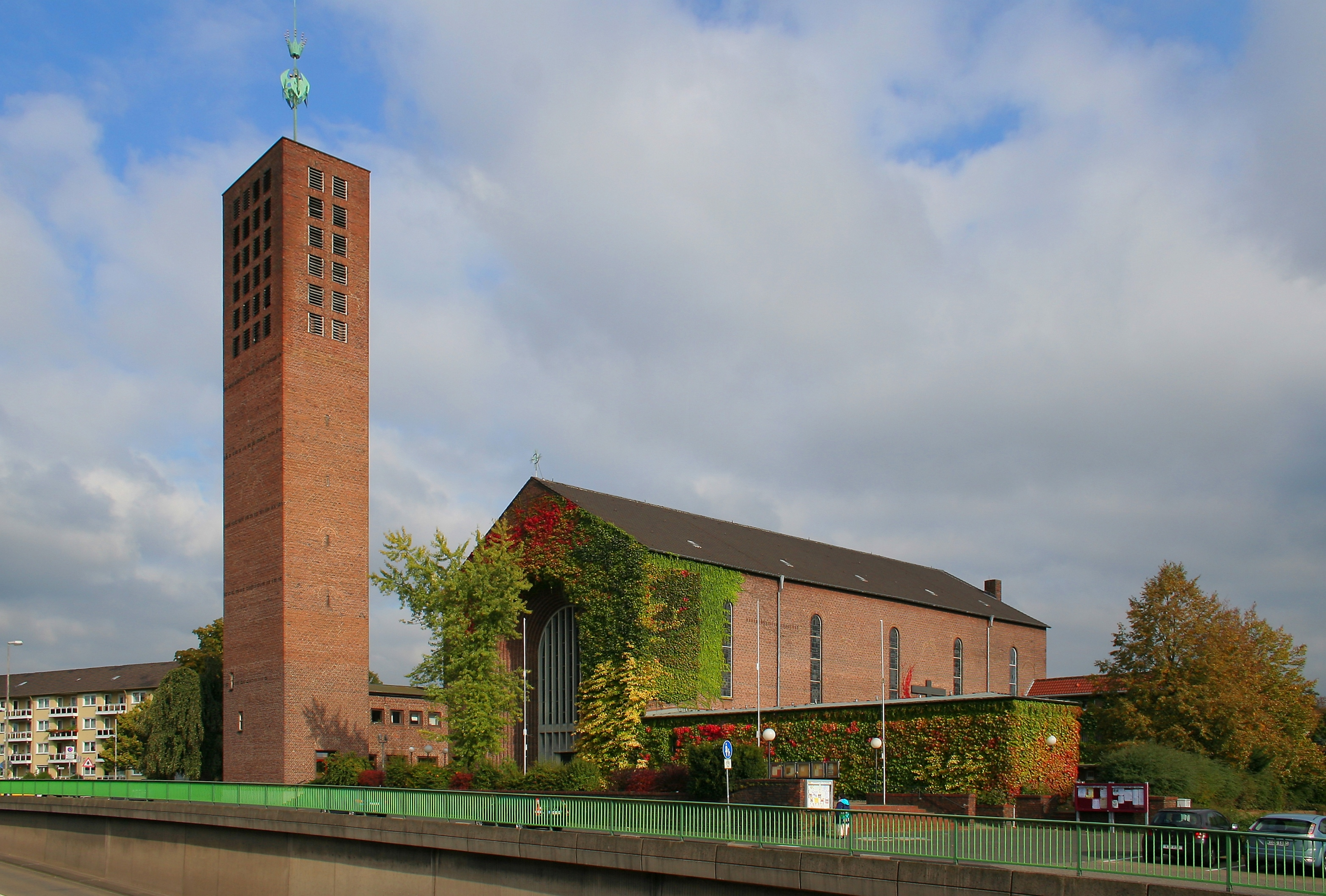 Christus-König-Kirche in Leverkusen-Küppersteg. Außenansichten.